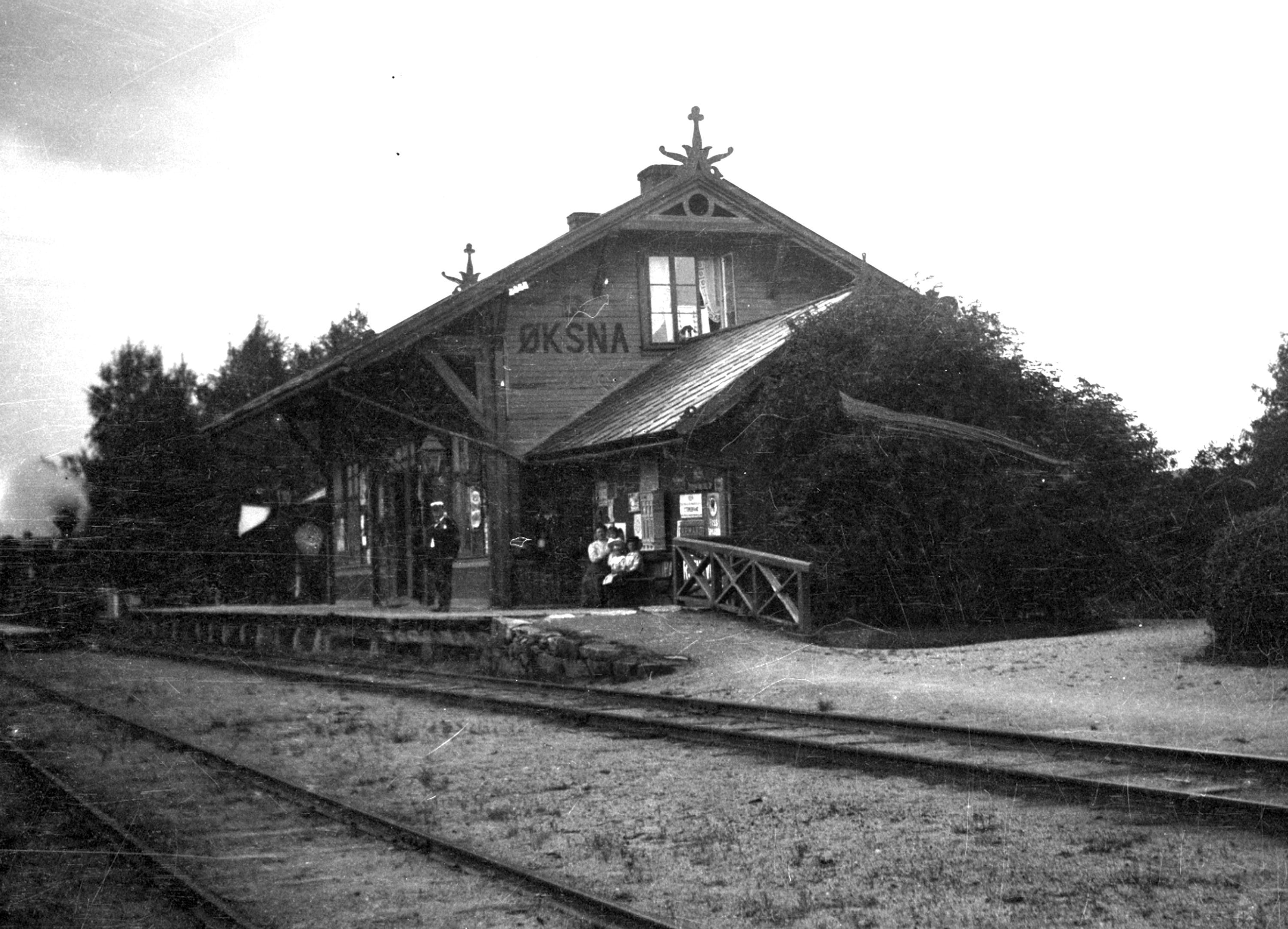 Øksna stasjon. Foto: Erling Syringen. Fra Glomdalsmuseets fotosamling i Digitalt museum.